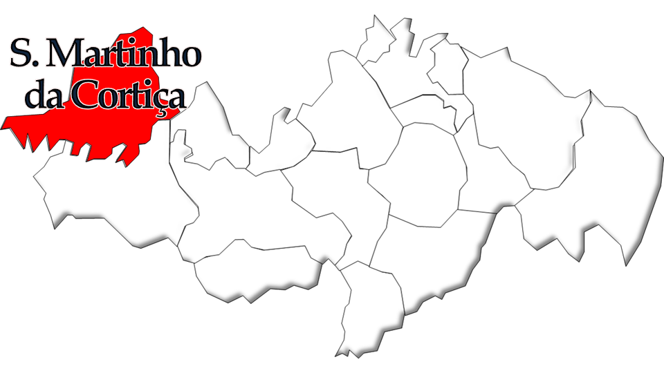 População